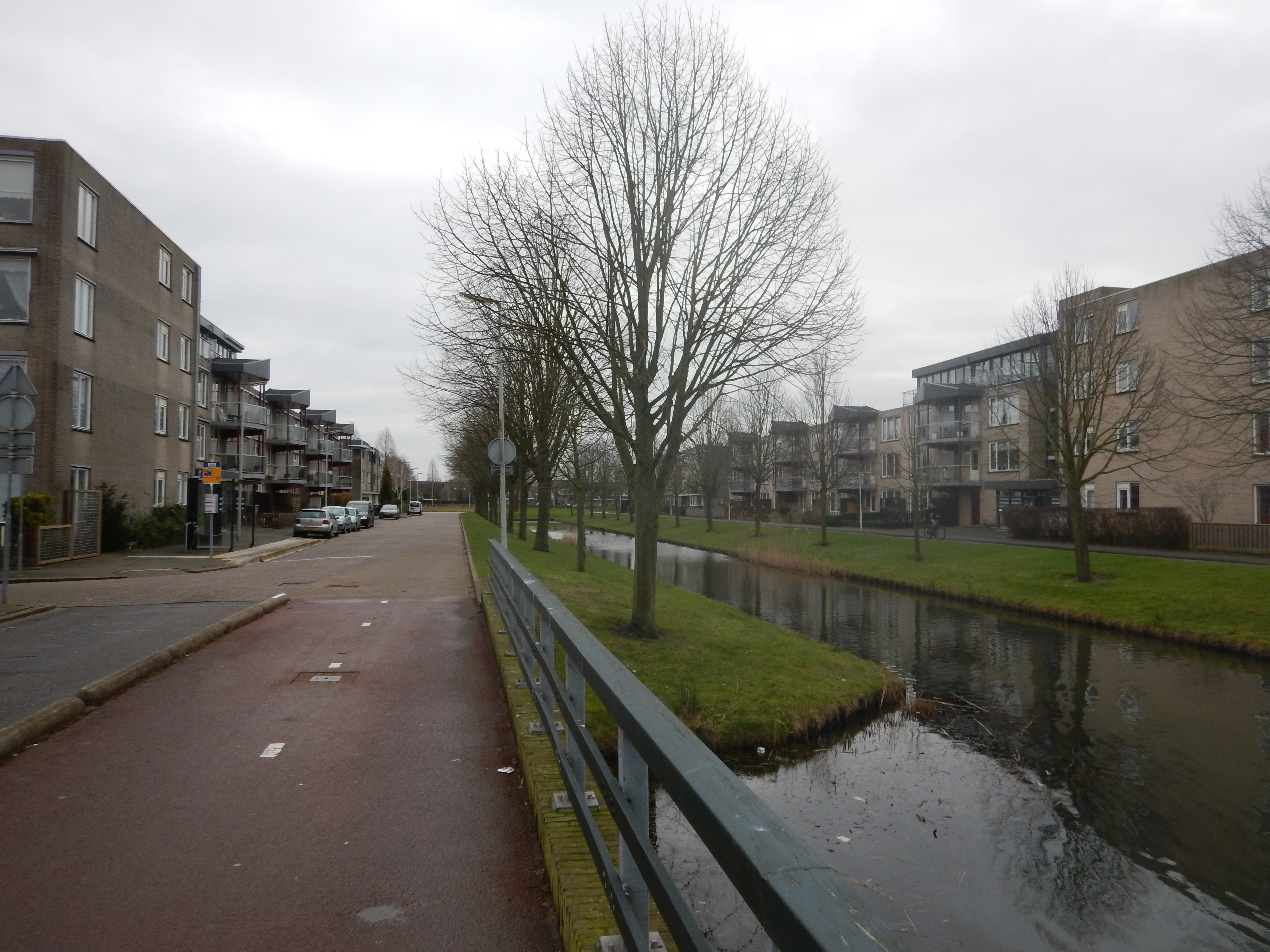 Singel langs Haydnsingel vanaf Harplaan 2